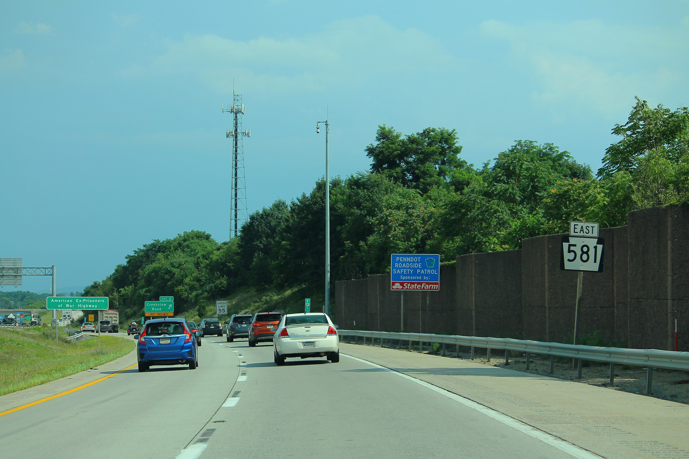 PA581eRoadSign